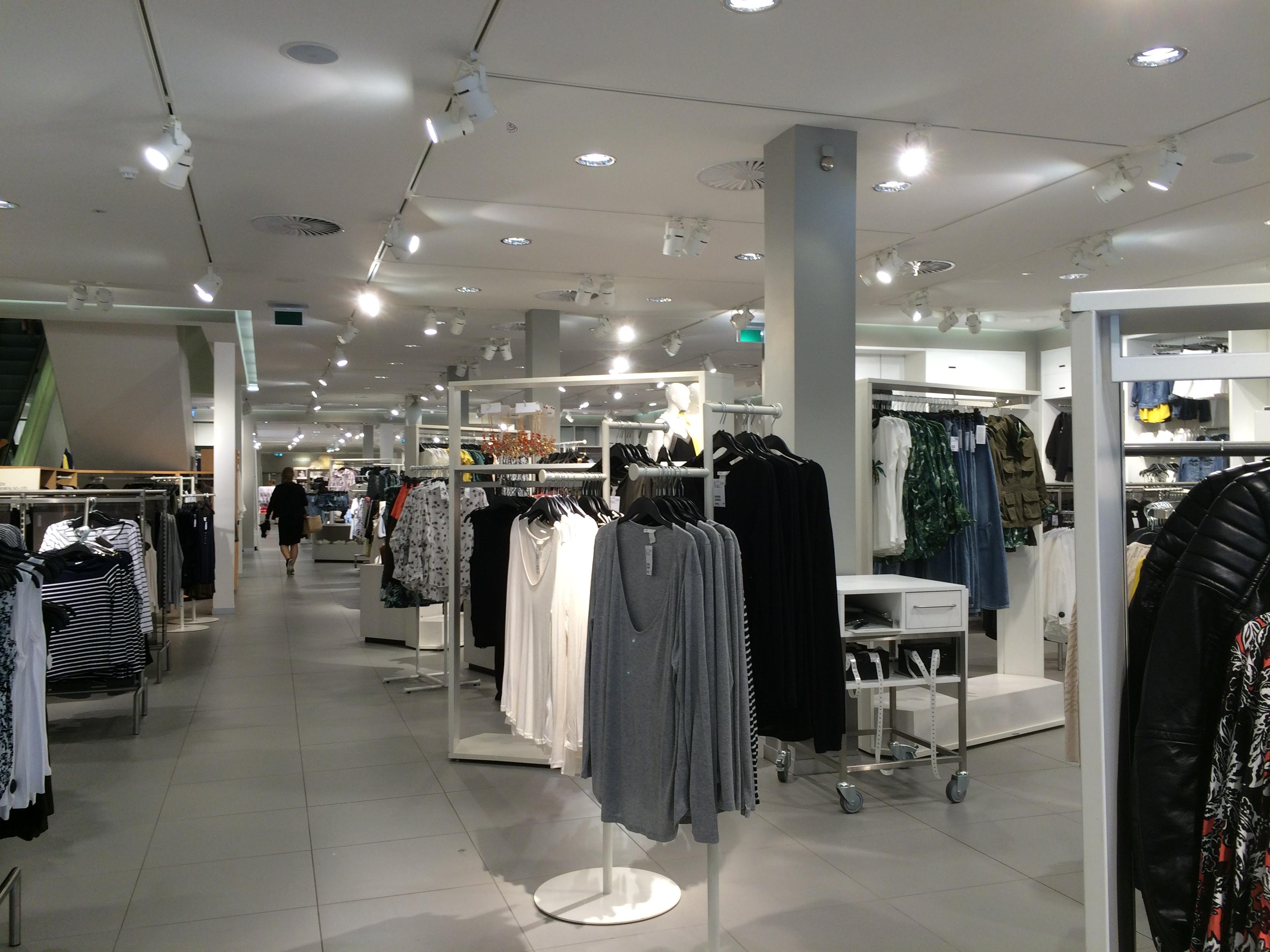 H&M Innen